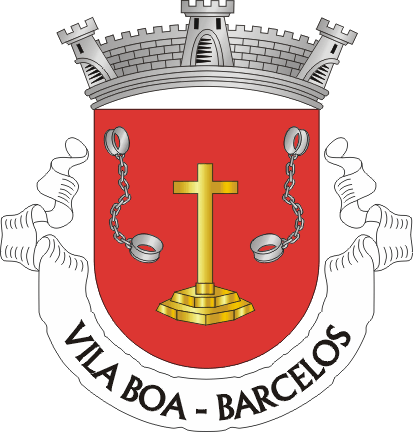 Crest of Vila Boa, a parish in the municipality of Barcelos